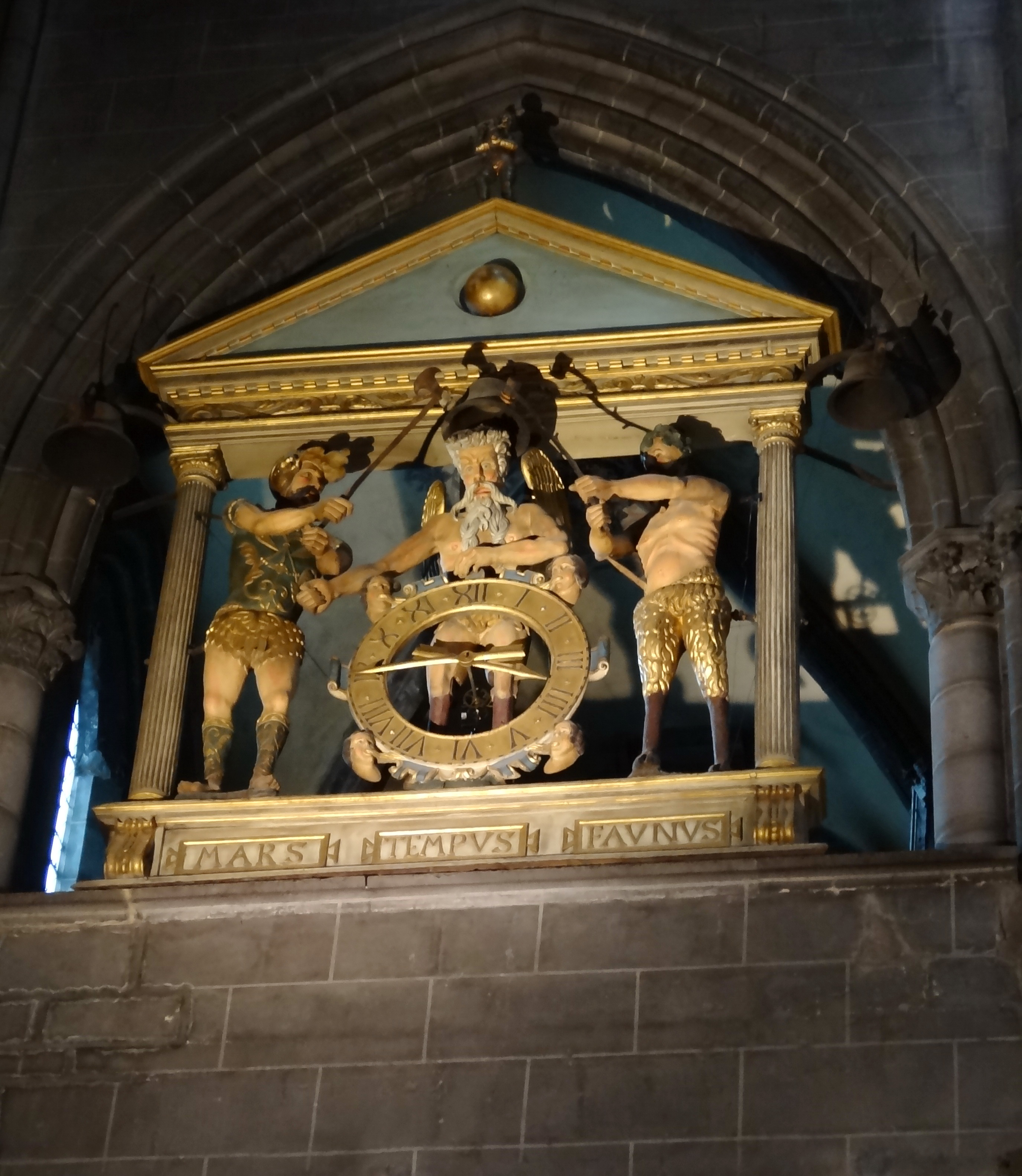 Cathédrale Notre-Dame-de-l'Assomption de Clermont - Jaquemart à trois personnages